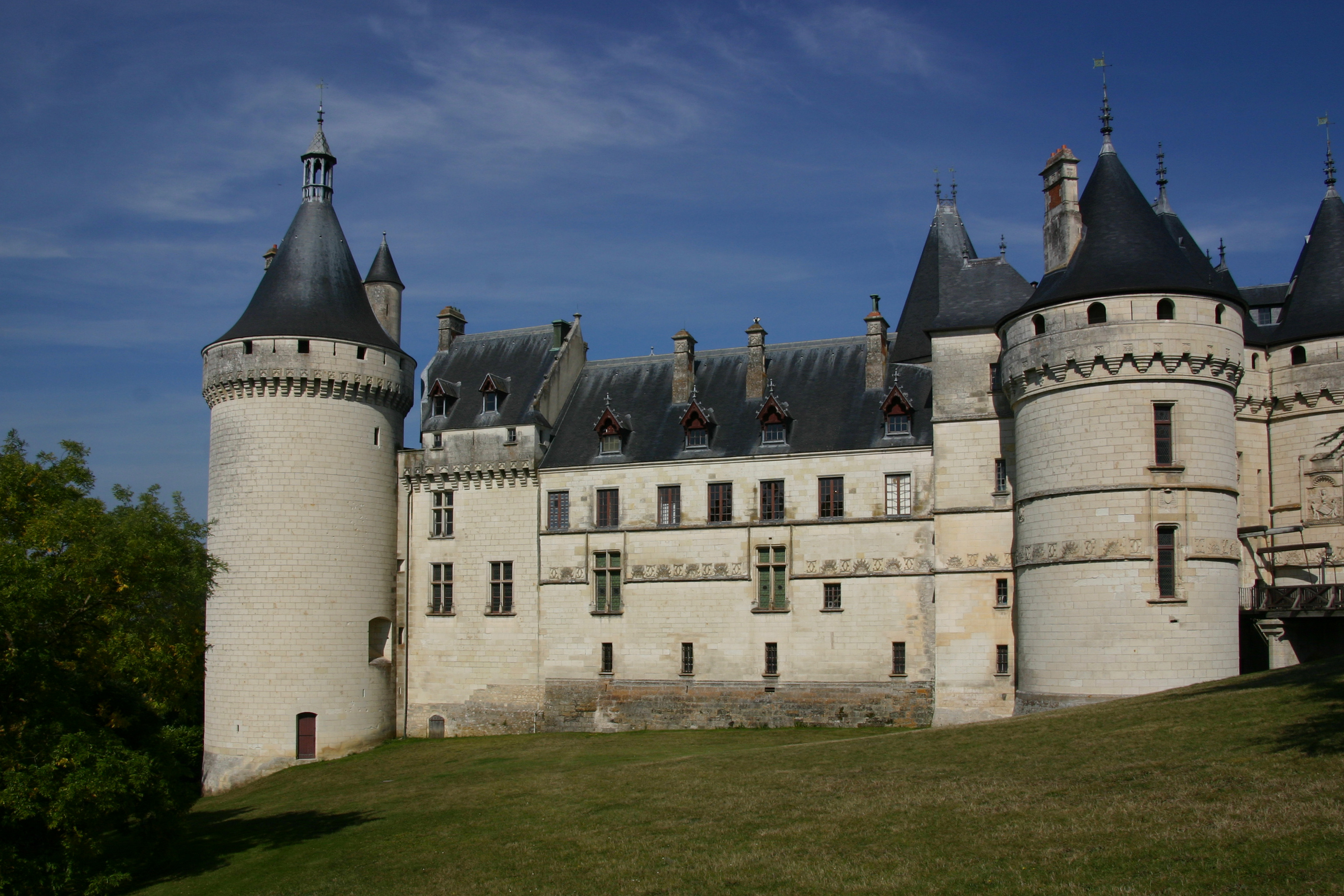 Château de Chaumont-sur-Loire